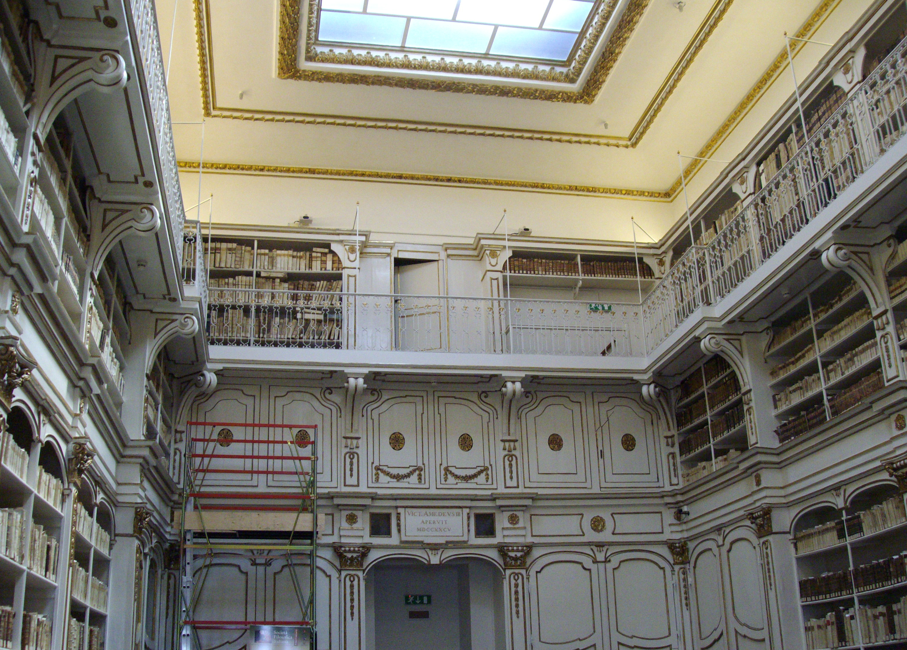 Sala Settecentesca, Biblioteca Universitaria di Cagliari